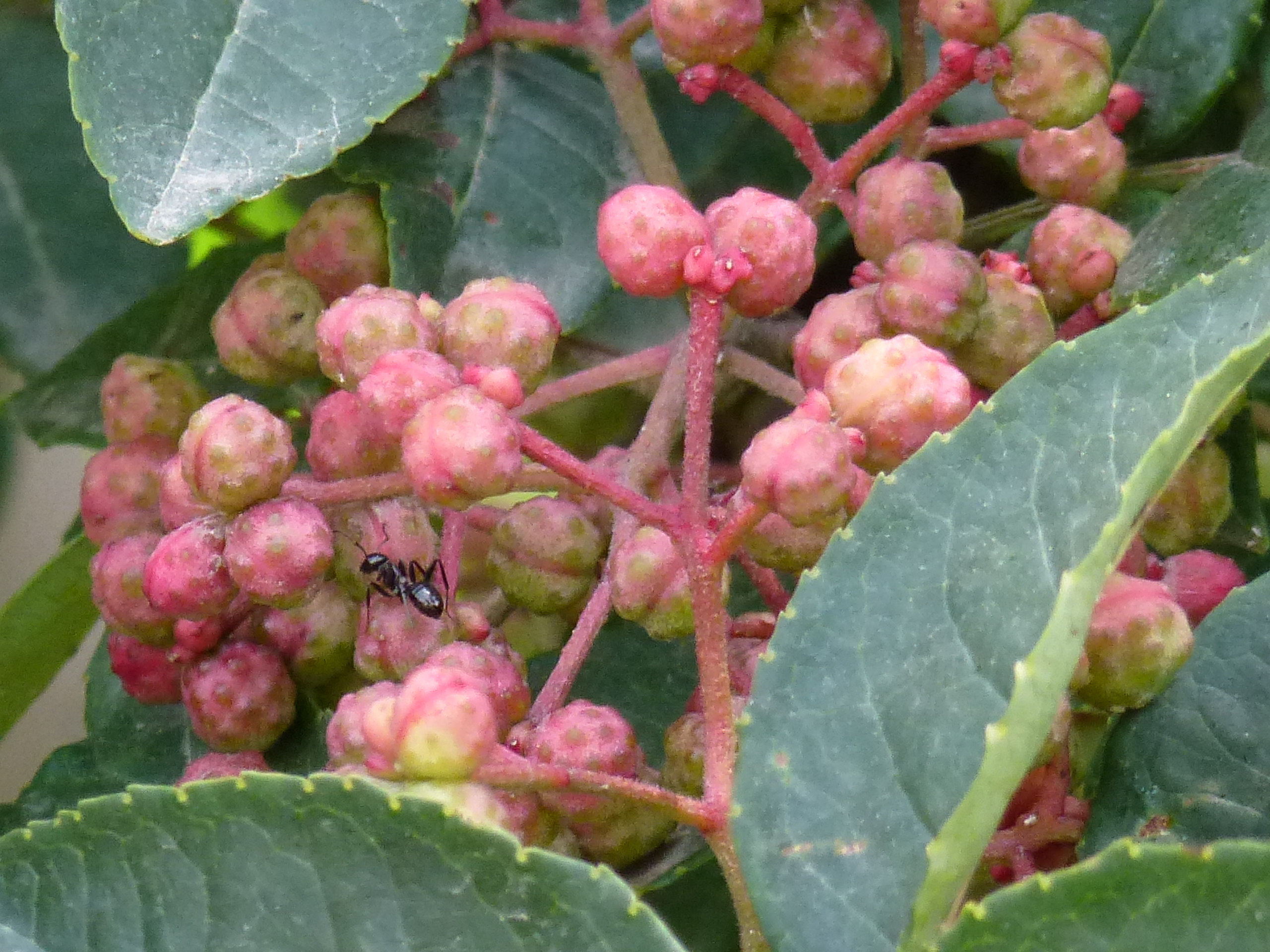 Fruits du poivrier du Sichuan à Liujiaxia.